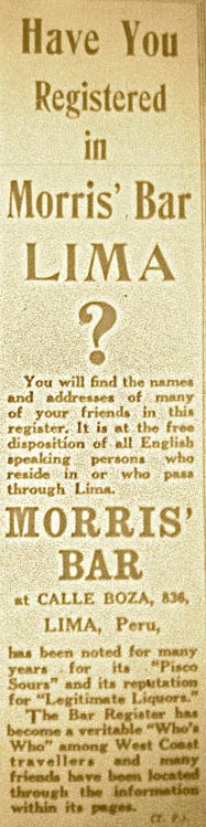 Aviso del Morris Bar publicado en el semanario South Pacific Mail de Valparaíso, Chile en julio de 1924, anunciando el registro de visitas y que es reconocido por sus "Pisco Sours" desde hace muchos años.